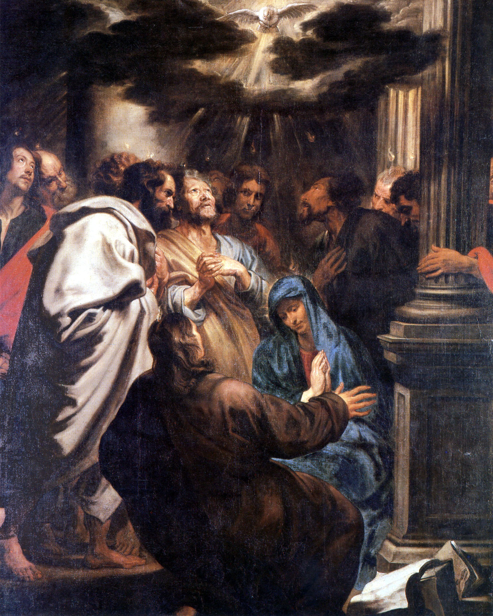 In der "Ausgießung des Heiligen Geistes" stellte van Dyck das Pfingstwunder dar, das in der Apostelgeschichte des Neuen Testaments (2, 1-4) geschildert wird: Zu Pfingsten versammelten sich die Apostel und wurden vom heiligen Geist erfüllt, so dass sie anfingen, in anderen Sprachen zu predigen. Der dunkle Raum wird im Gemälde von oben nur durch das göttliche Licht erhellt, die Taube des Heiligen Geistes schwebt über den ergriffenen Aposteln. Über ihren Köpfen haben sich kleine Flammen niedergesetzt, als Zeichen der Aufnahme des heiligen Geistes. Das Gemälde wird in der Bildergalerie von Sanssouci gezeigt.